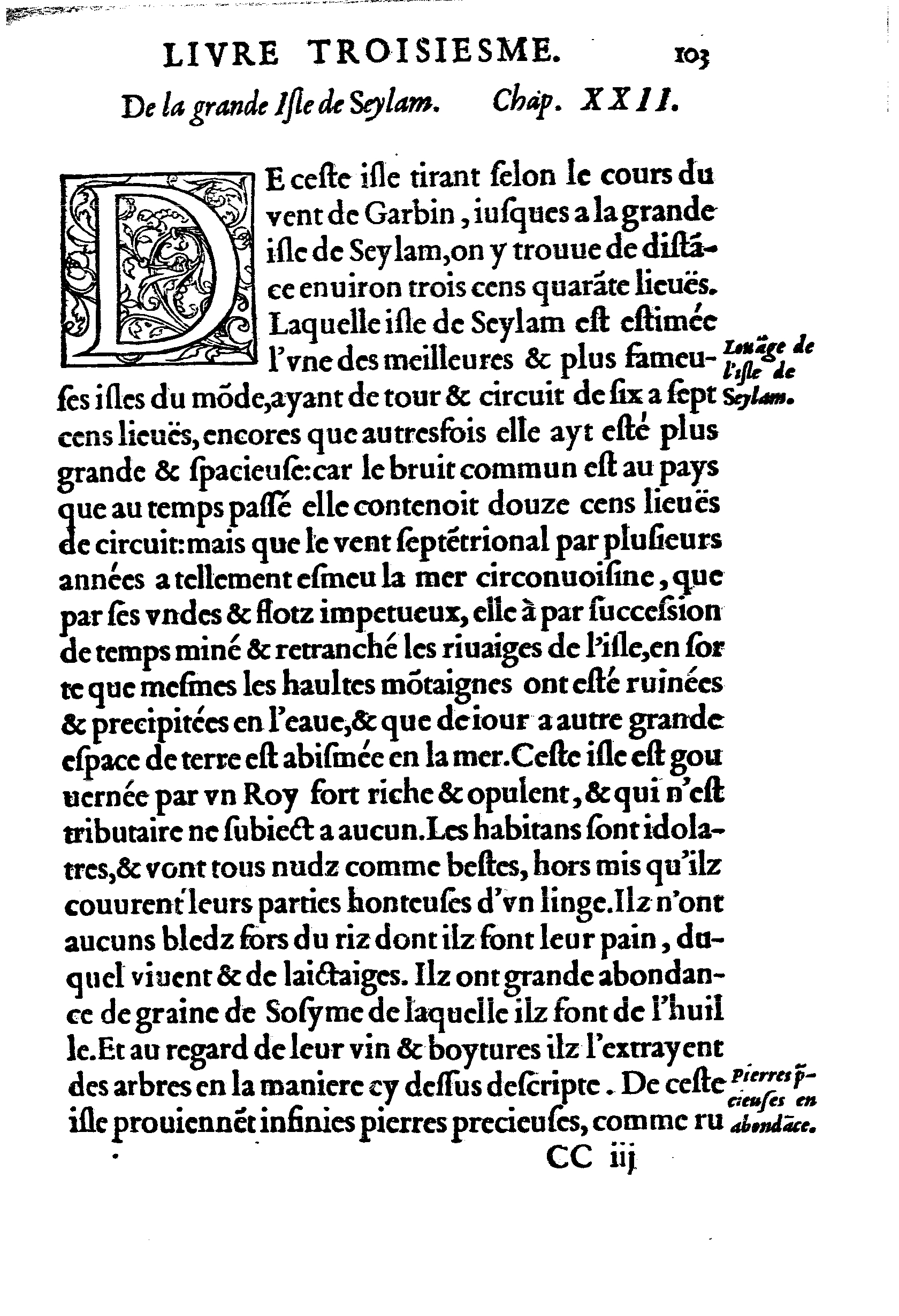 page n°223 of "la description géographiques des provinces..." by Marco Polo